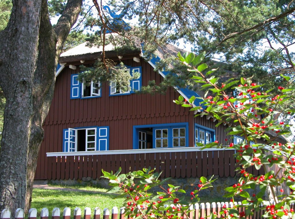 Kurische Nehrung: Haus von Thomas Mann in Nidden